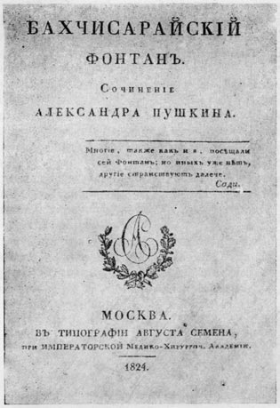 Титульный лист первого издания Бахчисарайского фонтана